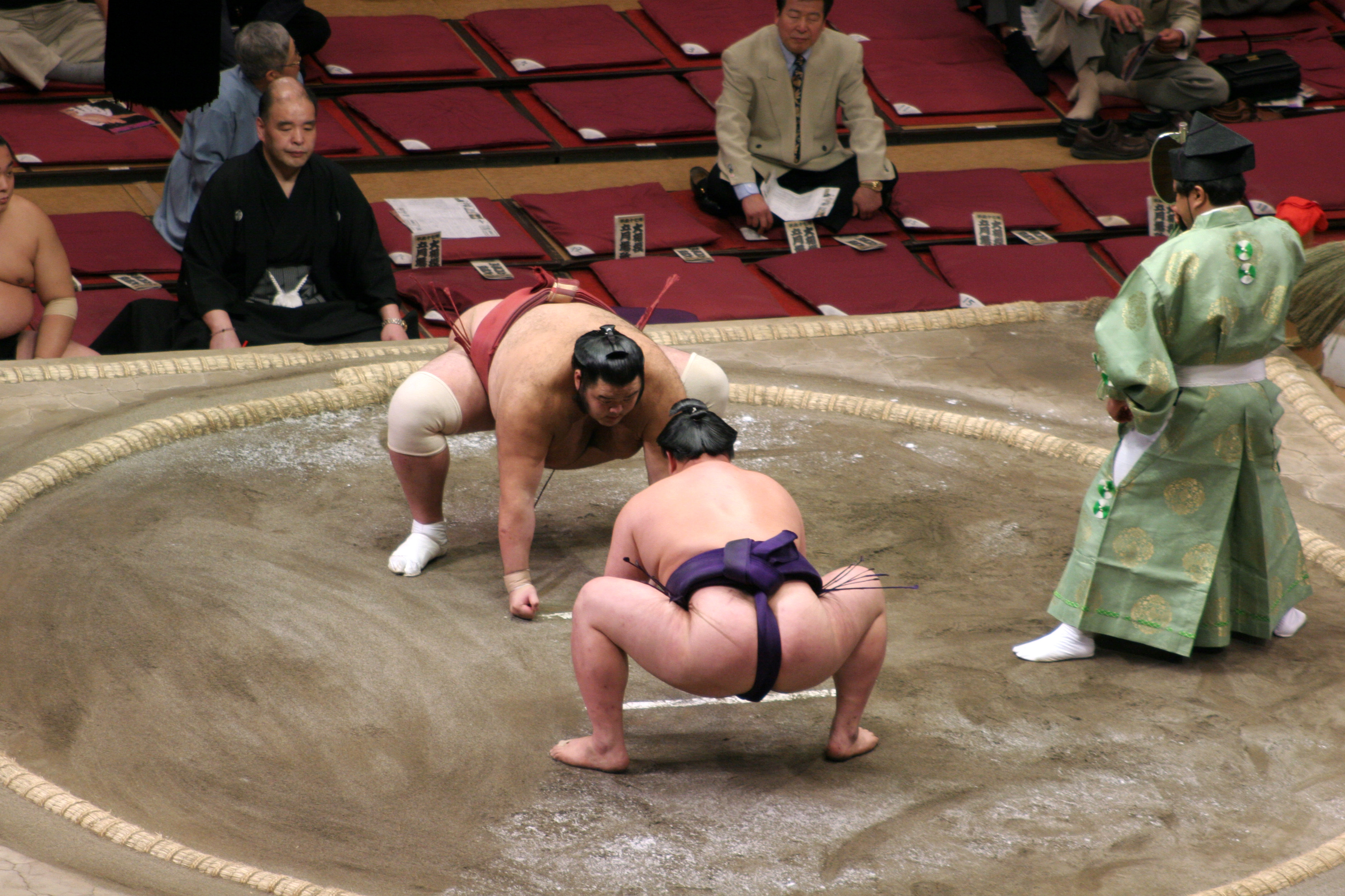 japon, tokyo, rituel d'intimidation avant le combat de sumo